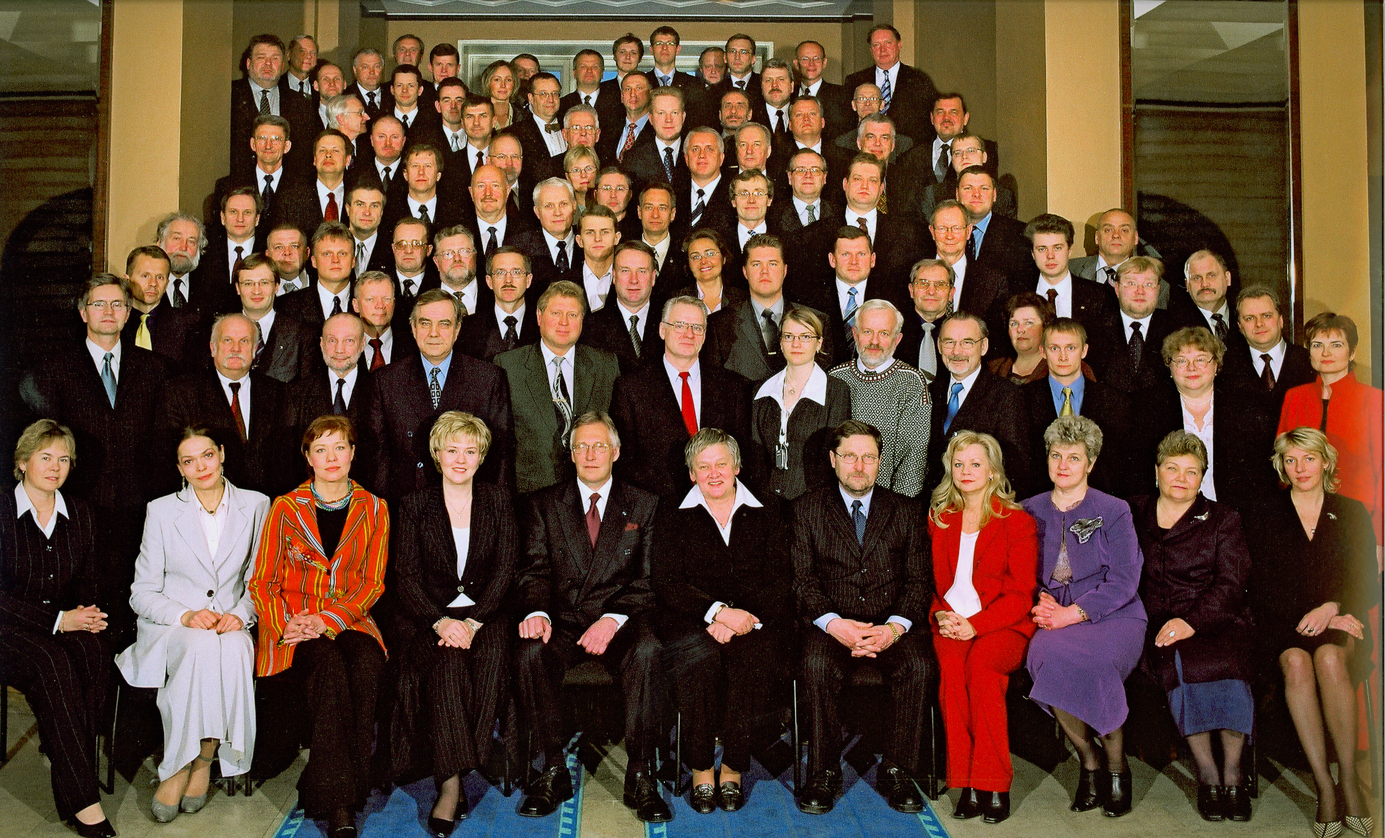 X Riigikogu koosseisu avapilt kevadel 2003.